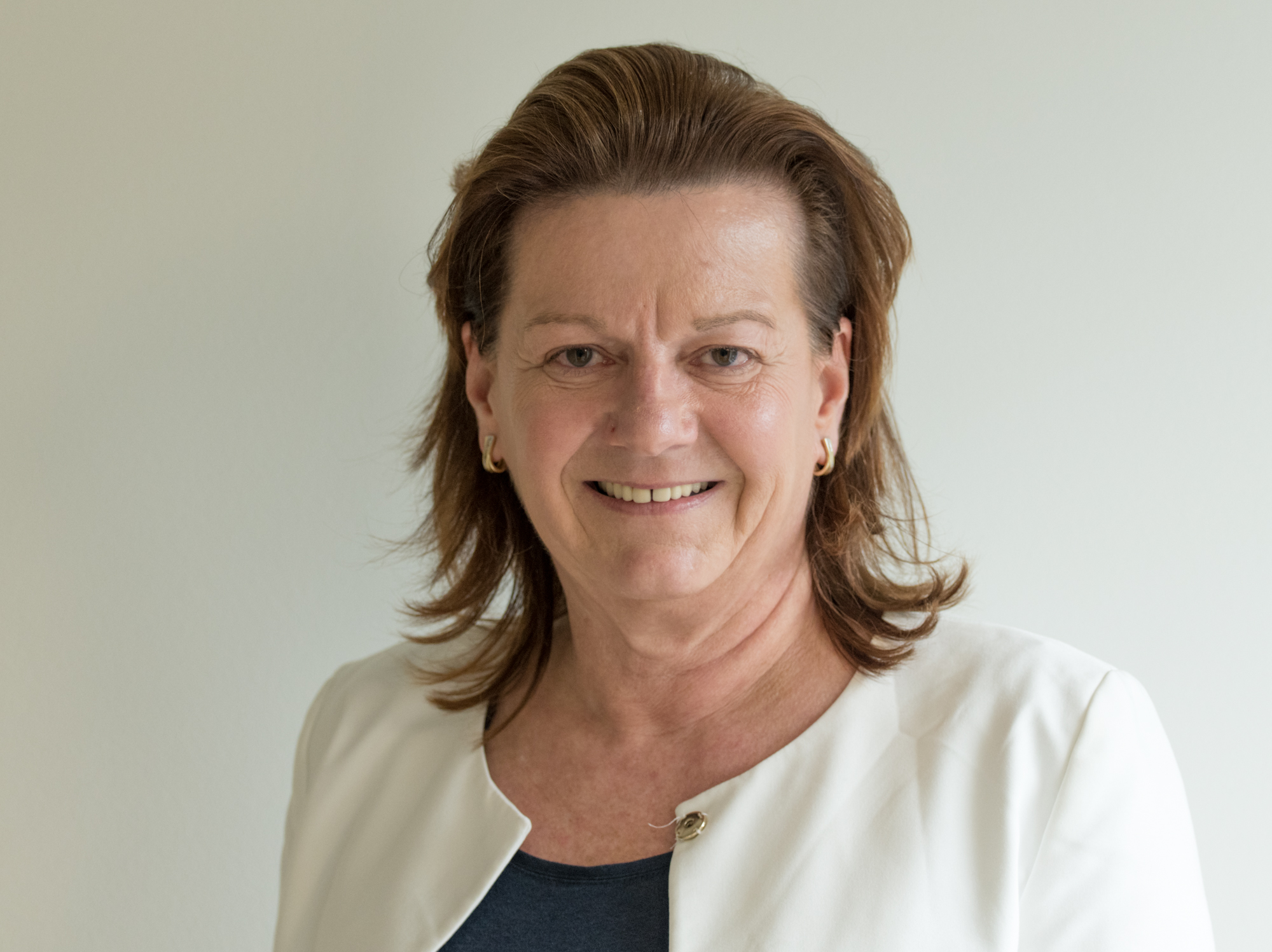 Die Linzer Vizebürgermeisterin Karin Hörzing bei der Eröffnung des Flüchtlingswohnheimes 'Haus der Menschenrechte' von SOS Menschenrechte in Linz